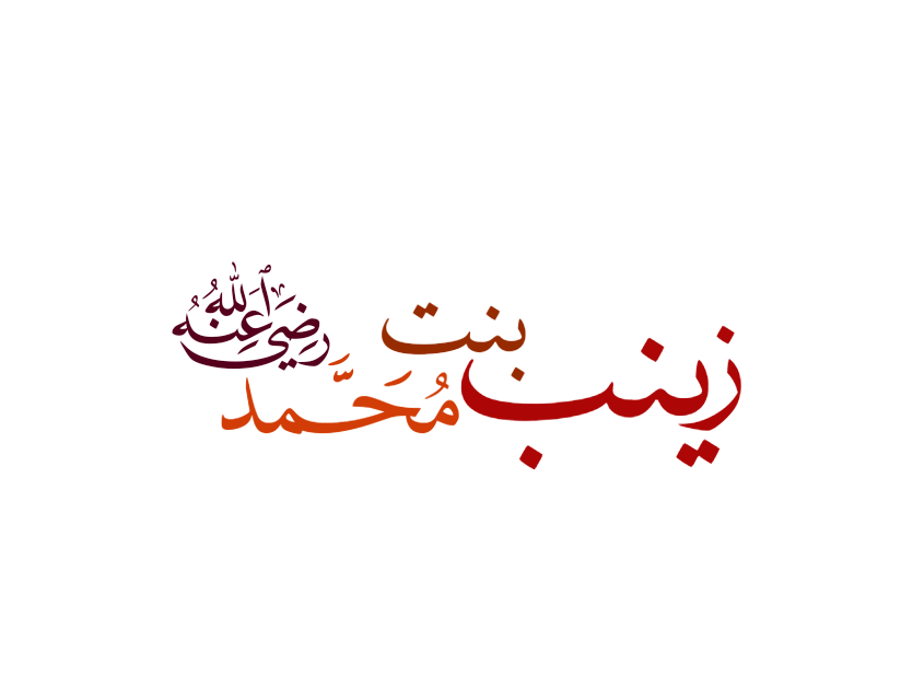 زینب بنت محمد اسم الخط